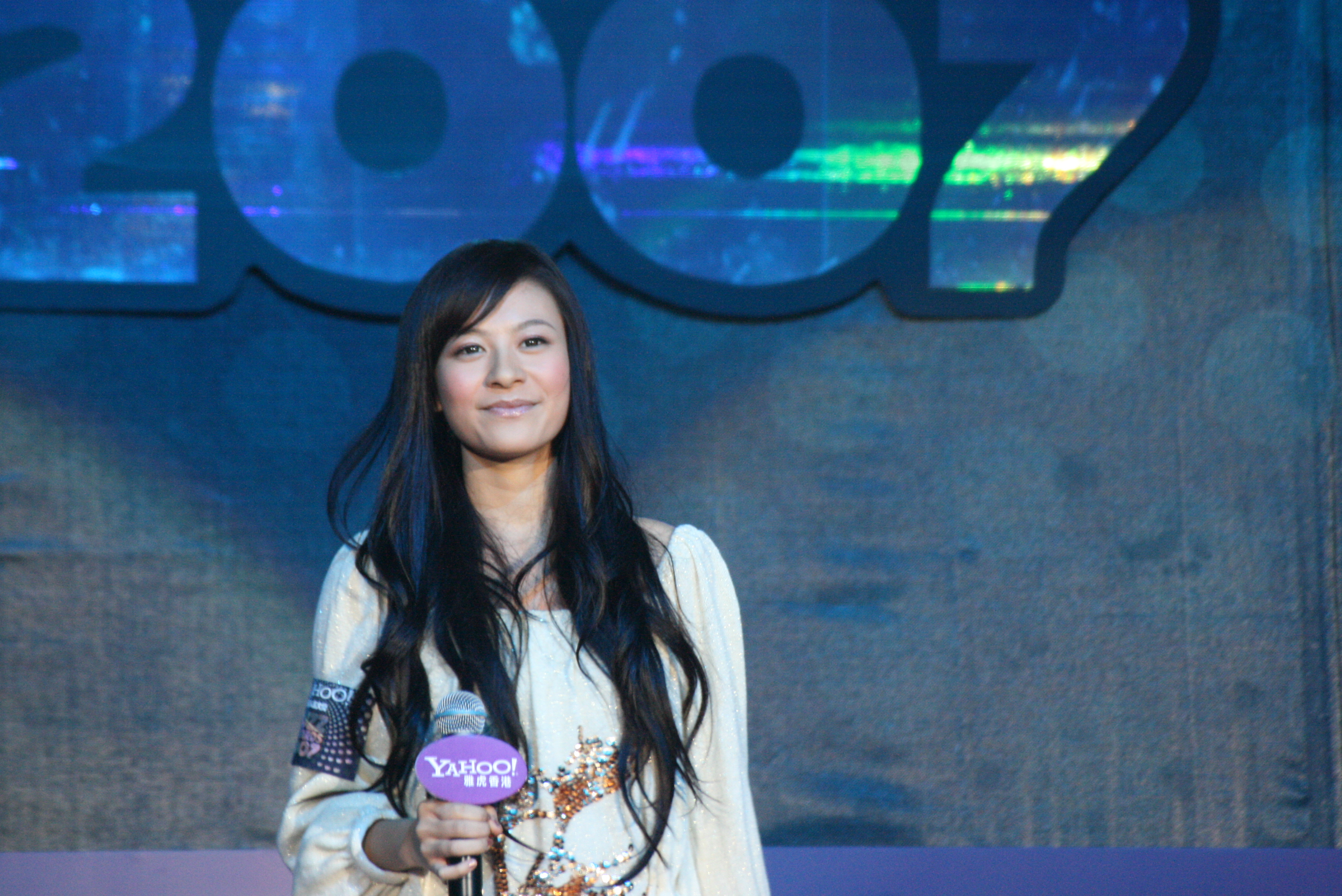 Elanne Kong (江若琳)江若琳